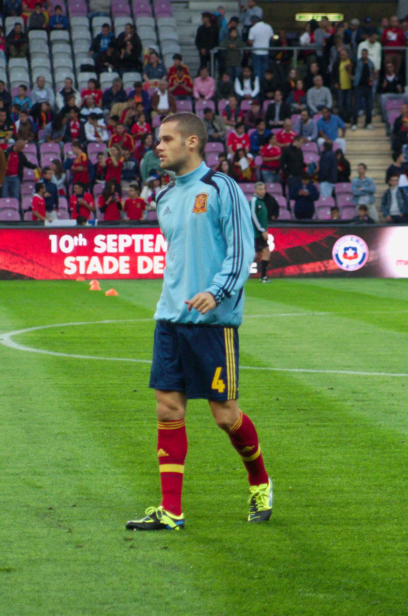 Spain - Chile - 10-09-2013 - Geneva - Mario Suarez